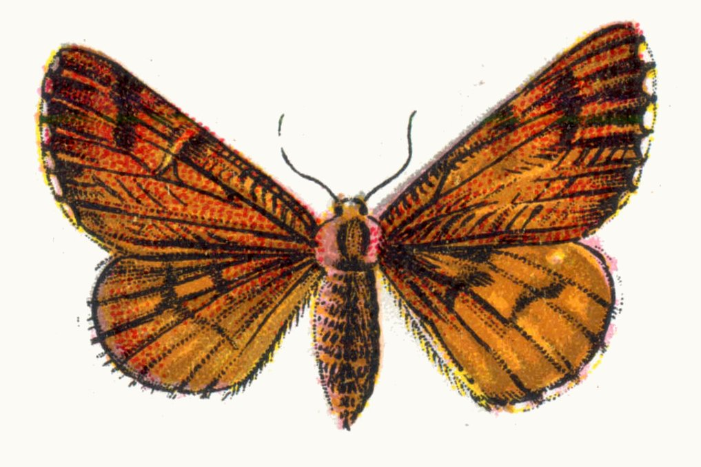 Bupalus piniaria femelle